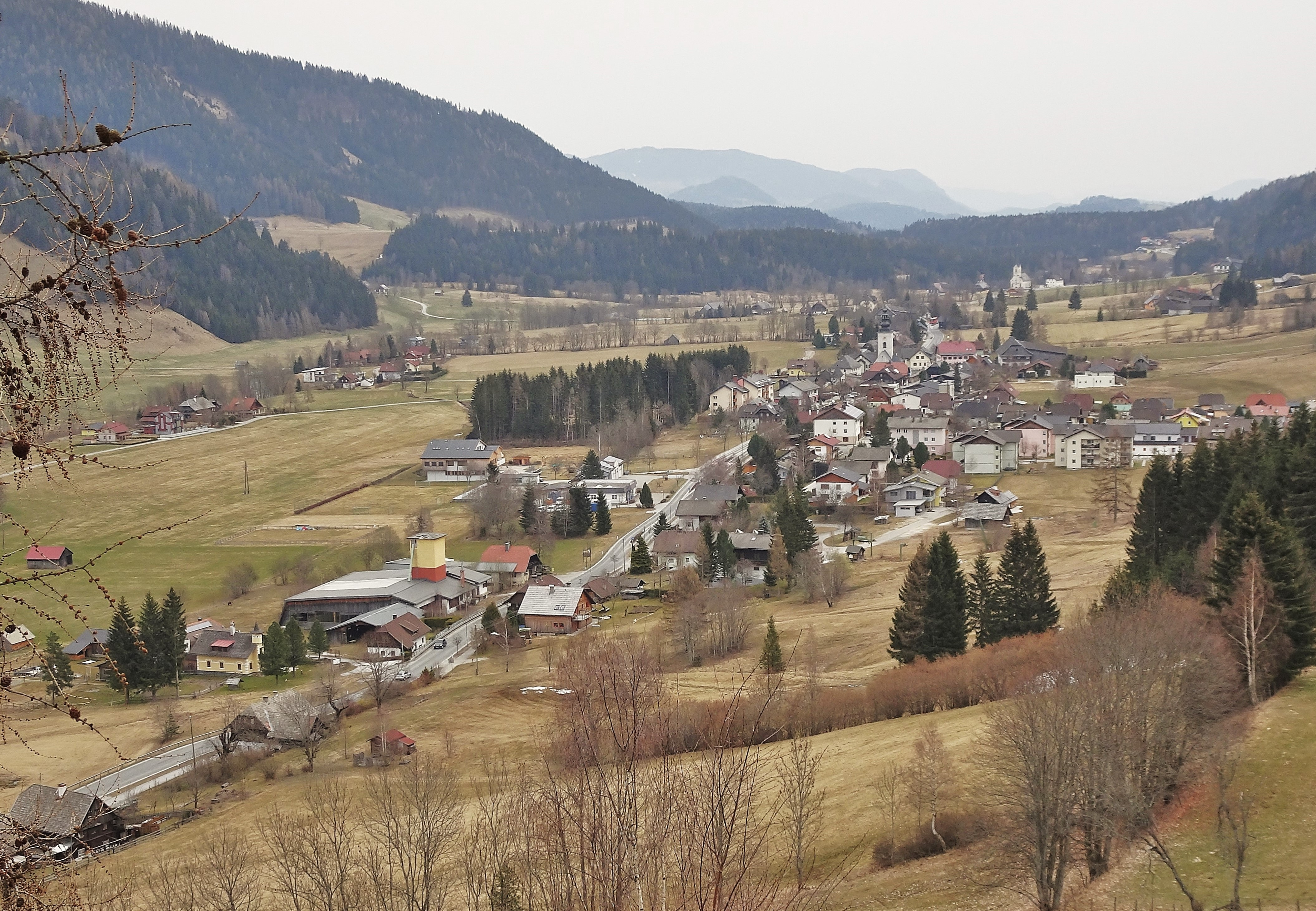 Gnesau (Kärnten), Ansicht von Westen